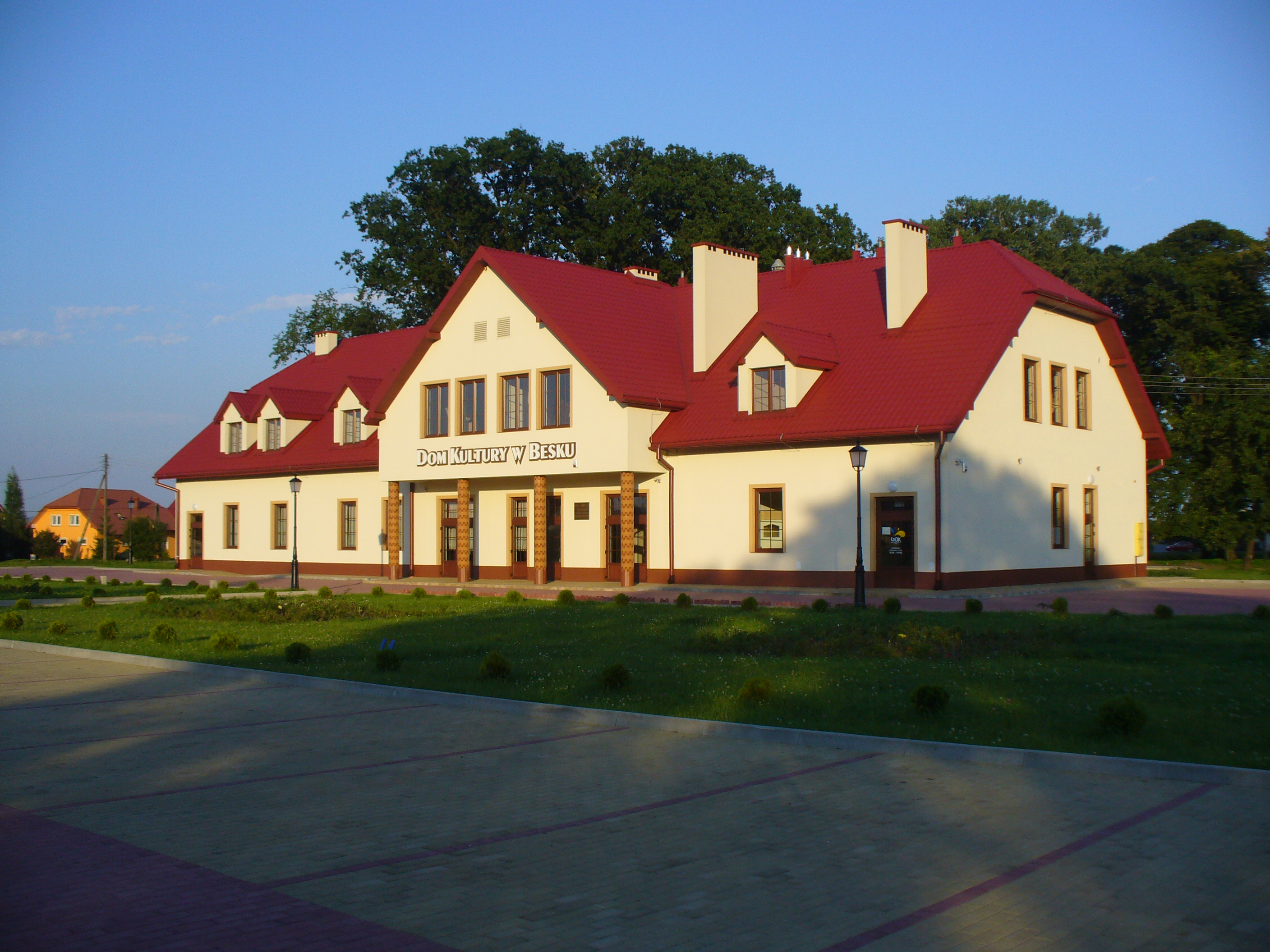 Besko - Dom Kultury